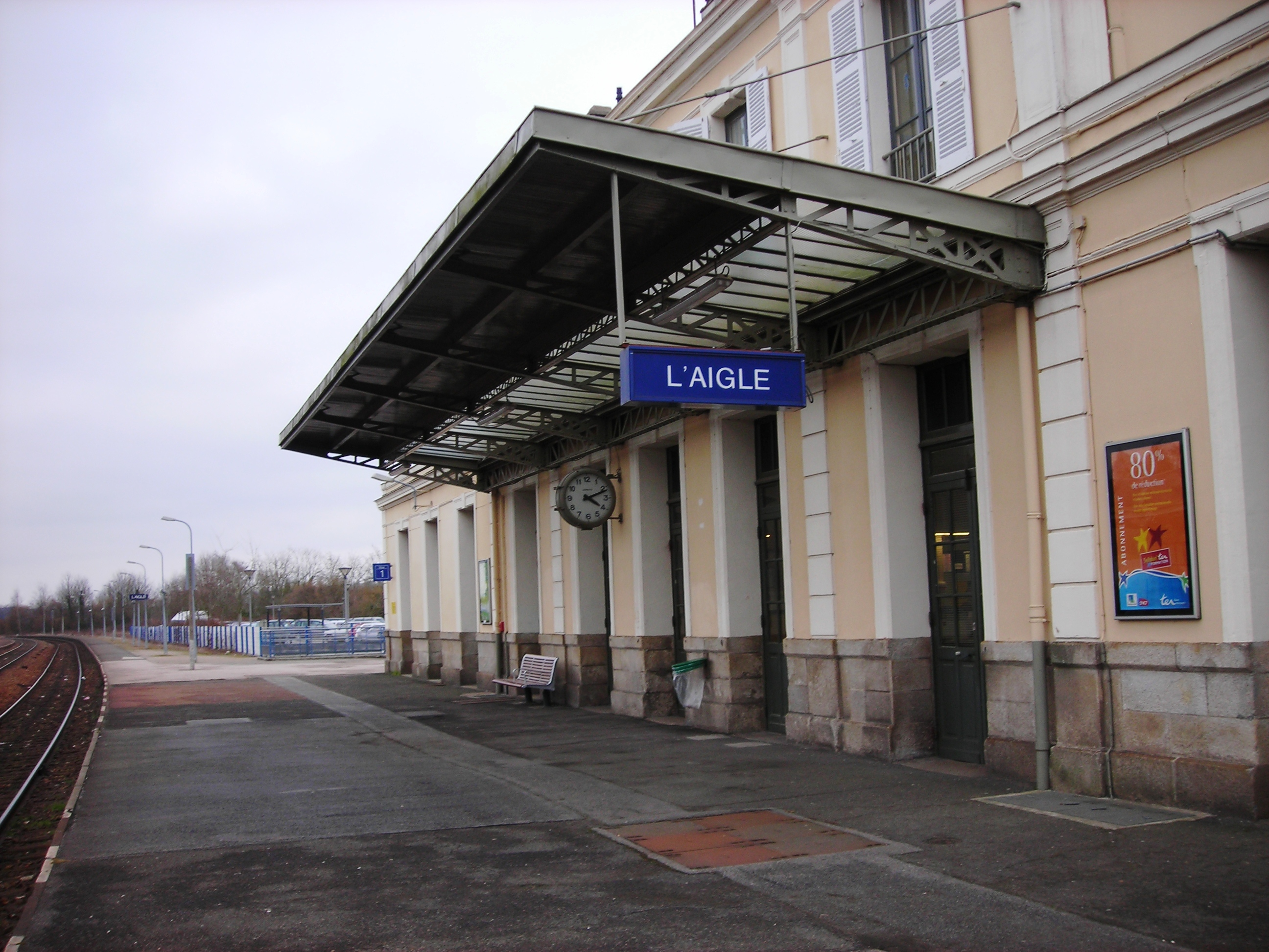 Quaie de la gare de l'aigle (Orne, France)